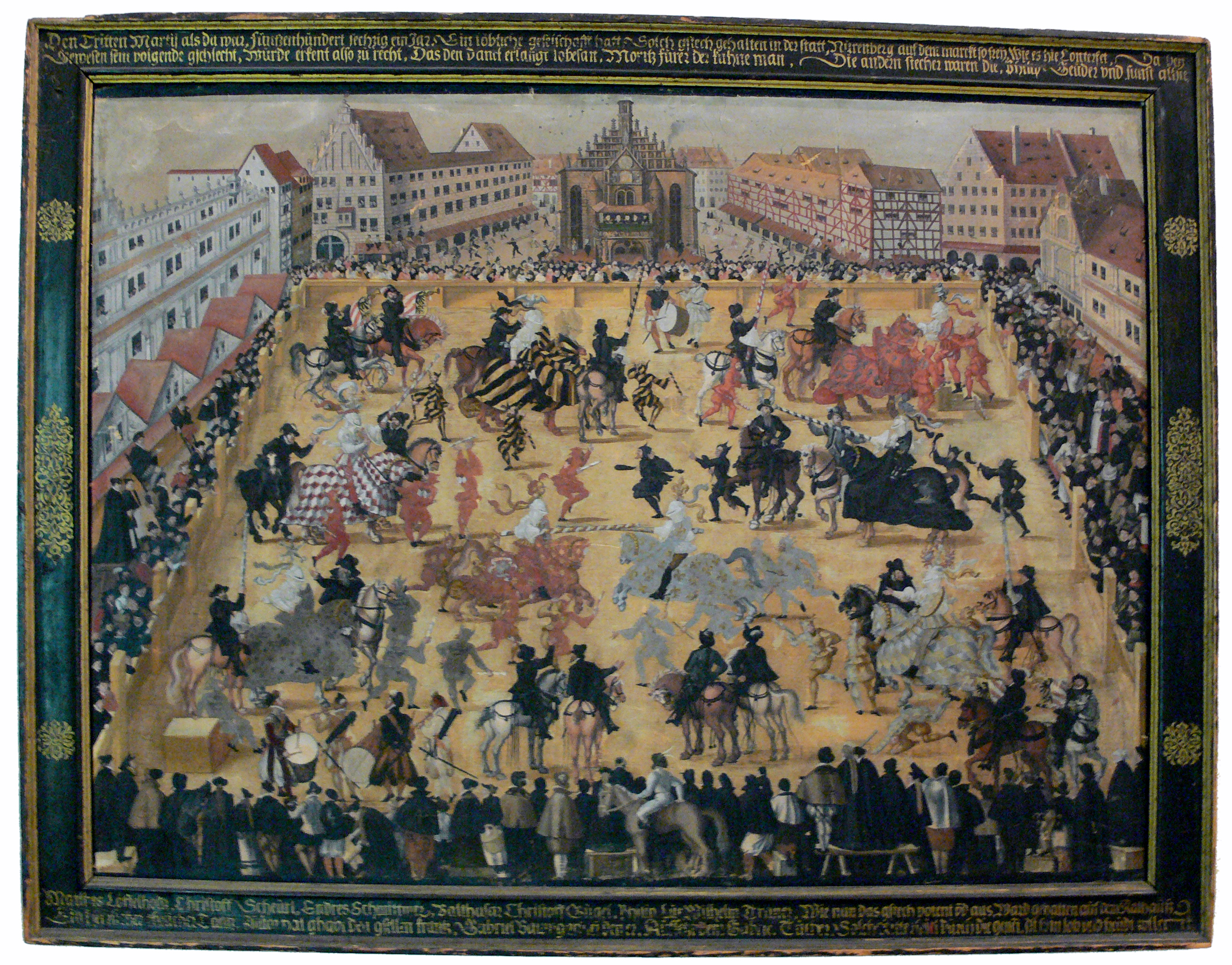 Jost Amman: Gesellen-Stechen der bürgerlichen Patrizier-Söhne Nürnbergs, vom 3. März 1561. Nürnberg, 1561. Bayerisches Nationalmuseum München, Inv. 49/43